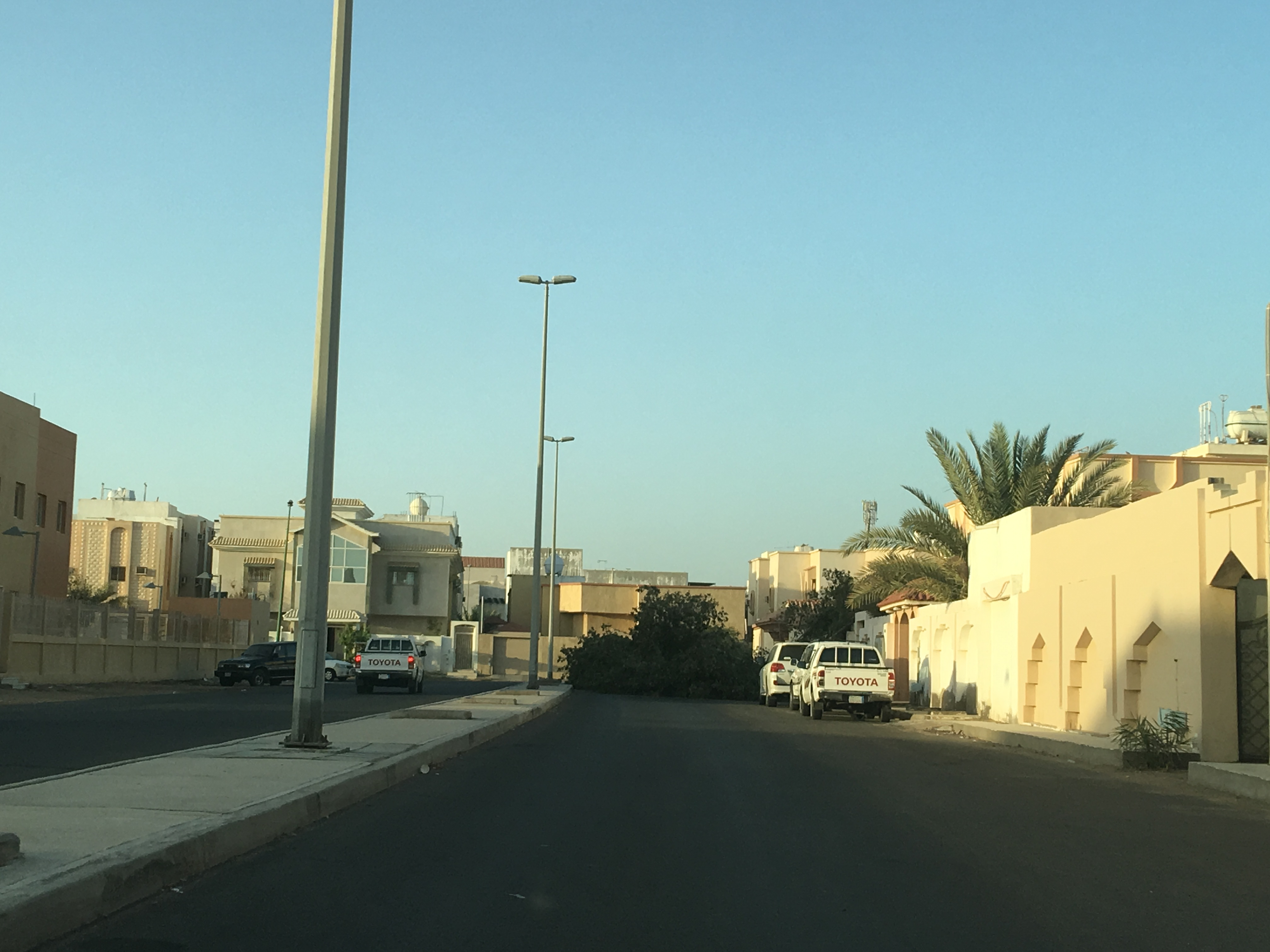 Al Jamiyah Al Arabiyah, Yanbu 46429, Saudi Arabia